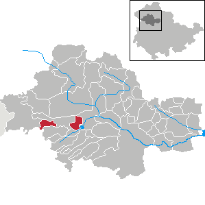 Niederdorla in Thuringia - Unstrut-Hainich-Kreis